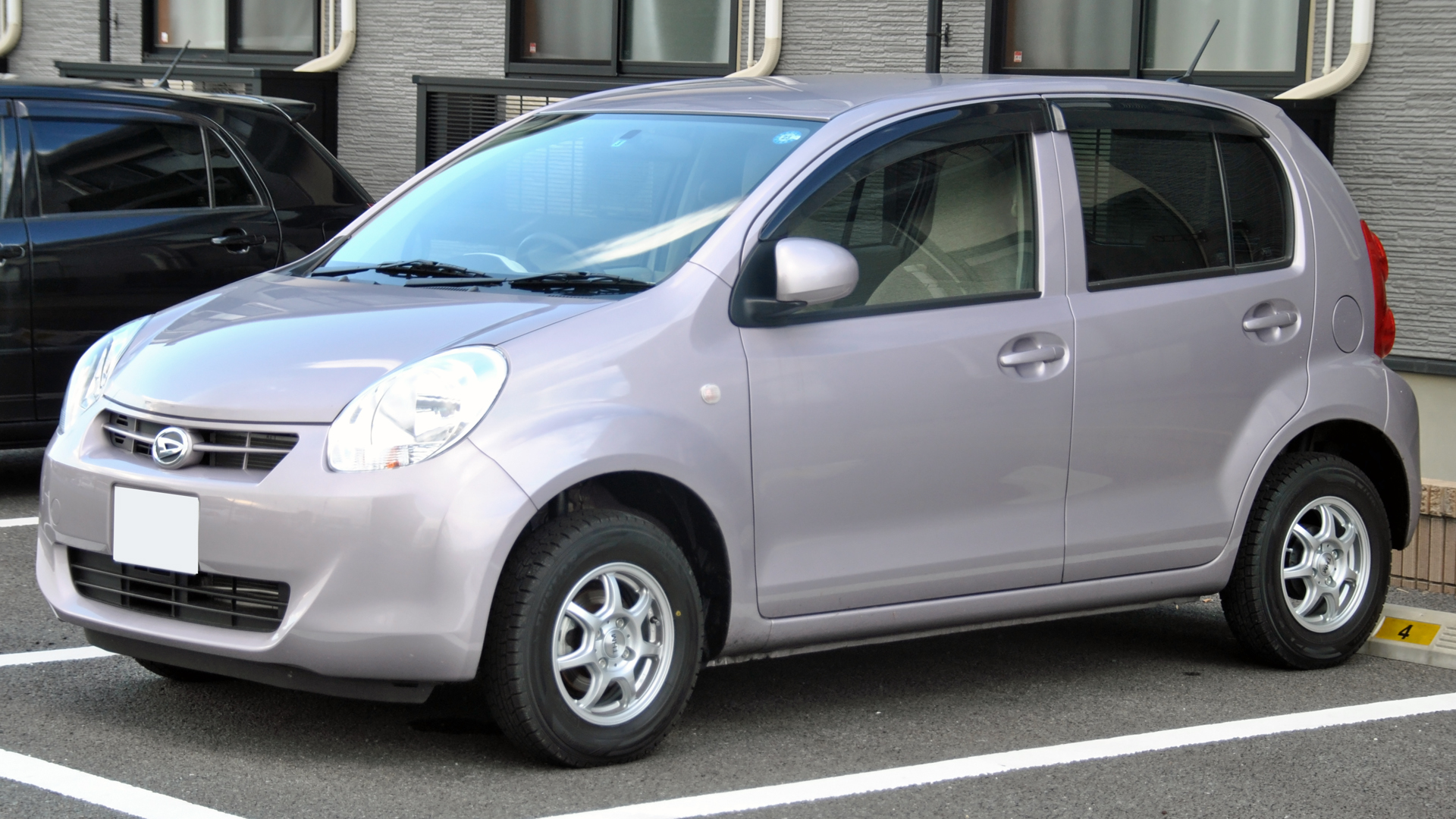 2nd_Daihatsu_Boon